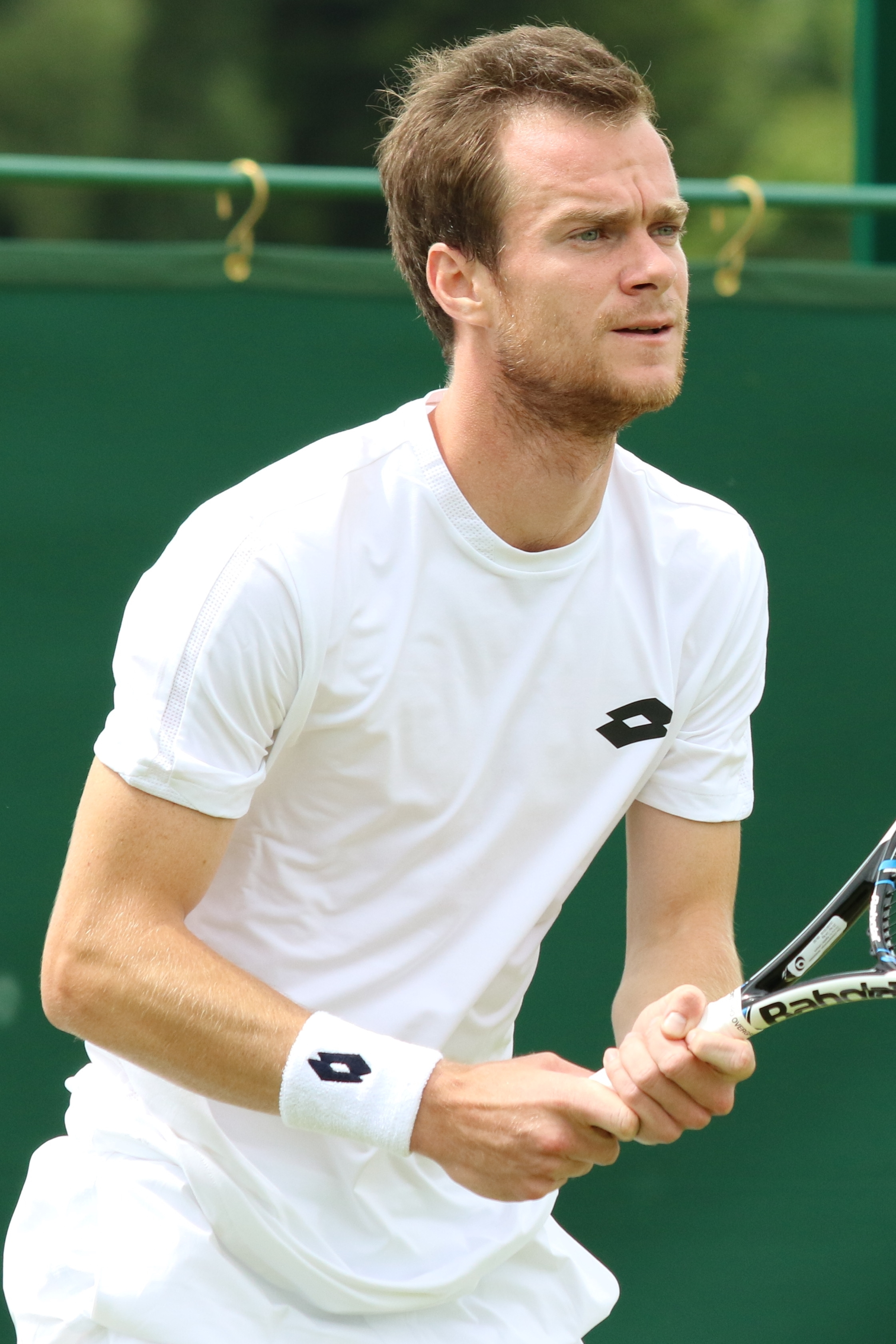 Satral WMQ16 (12)